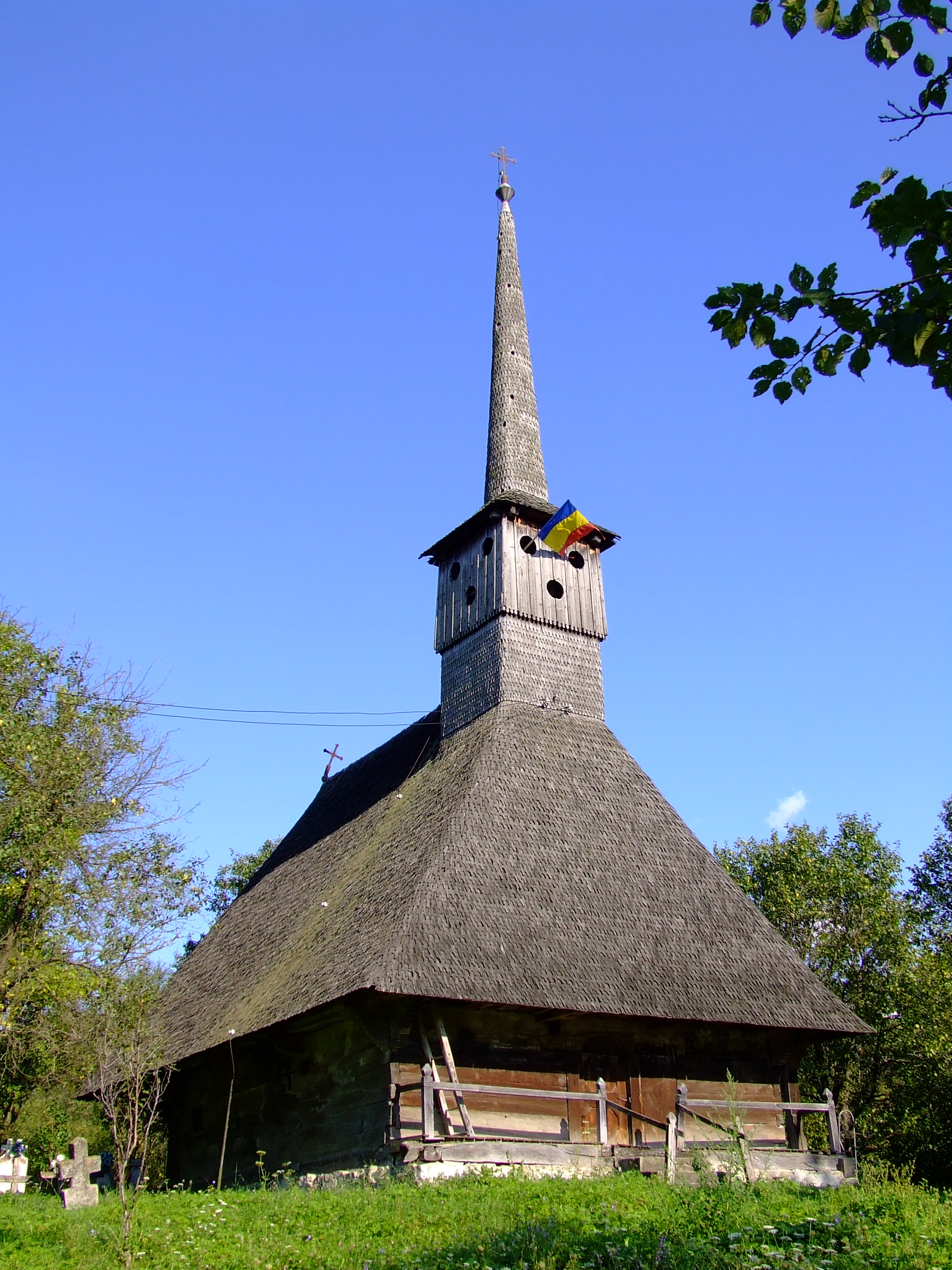 Biserica de lemn din Brebi, Sălaj.